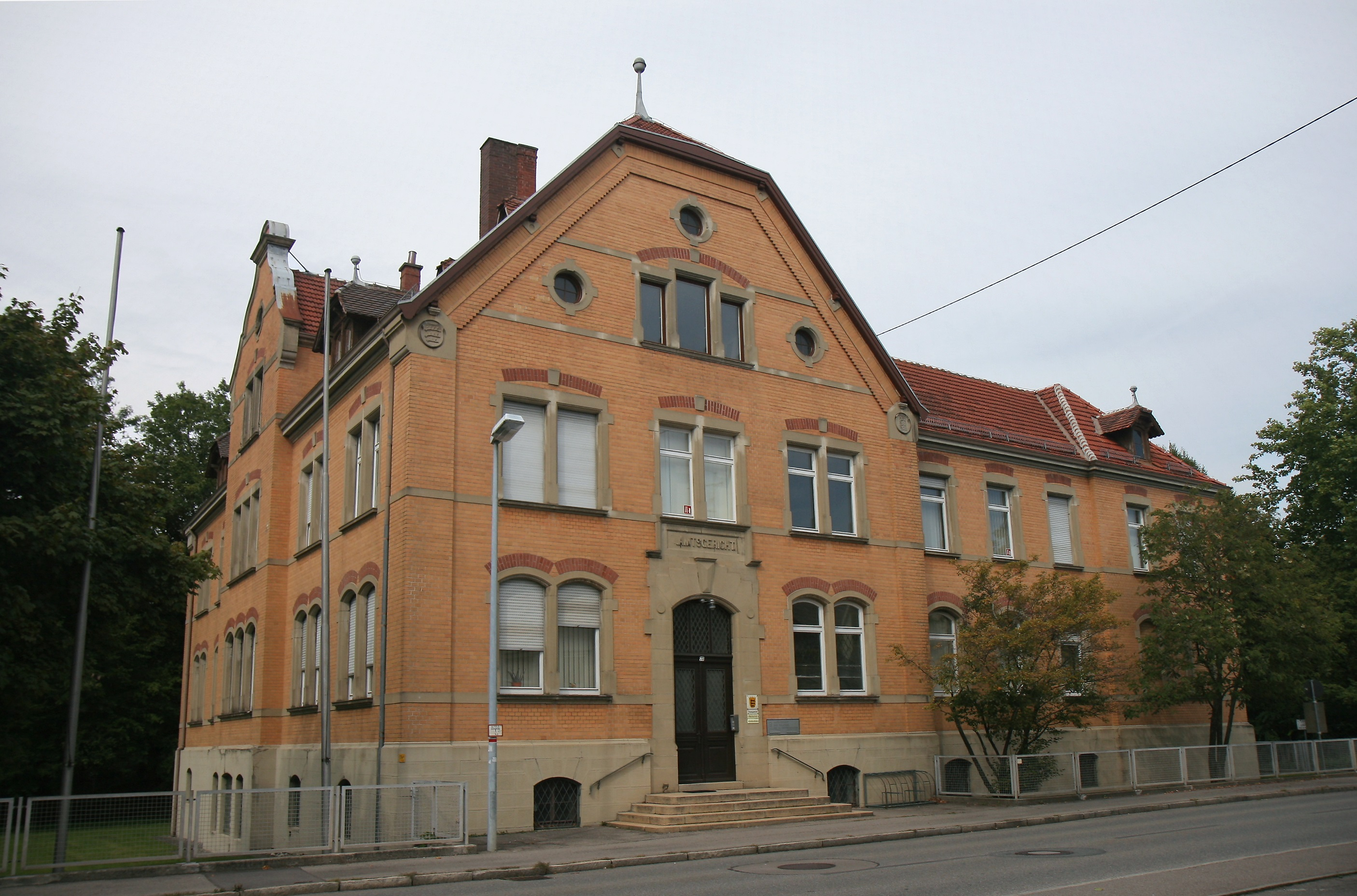 Amtsgericht Bad Waldsee, Wurzacher Straße 73 in Bad Waldsee.